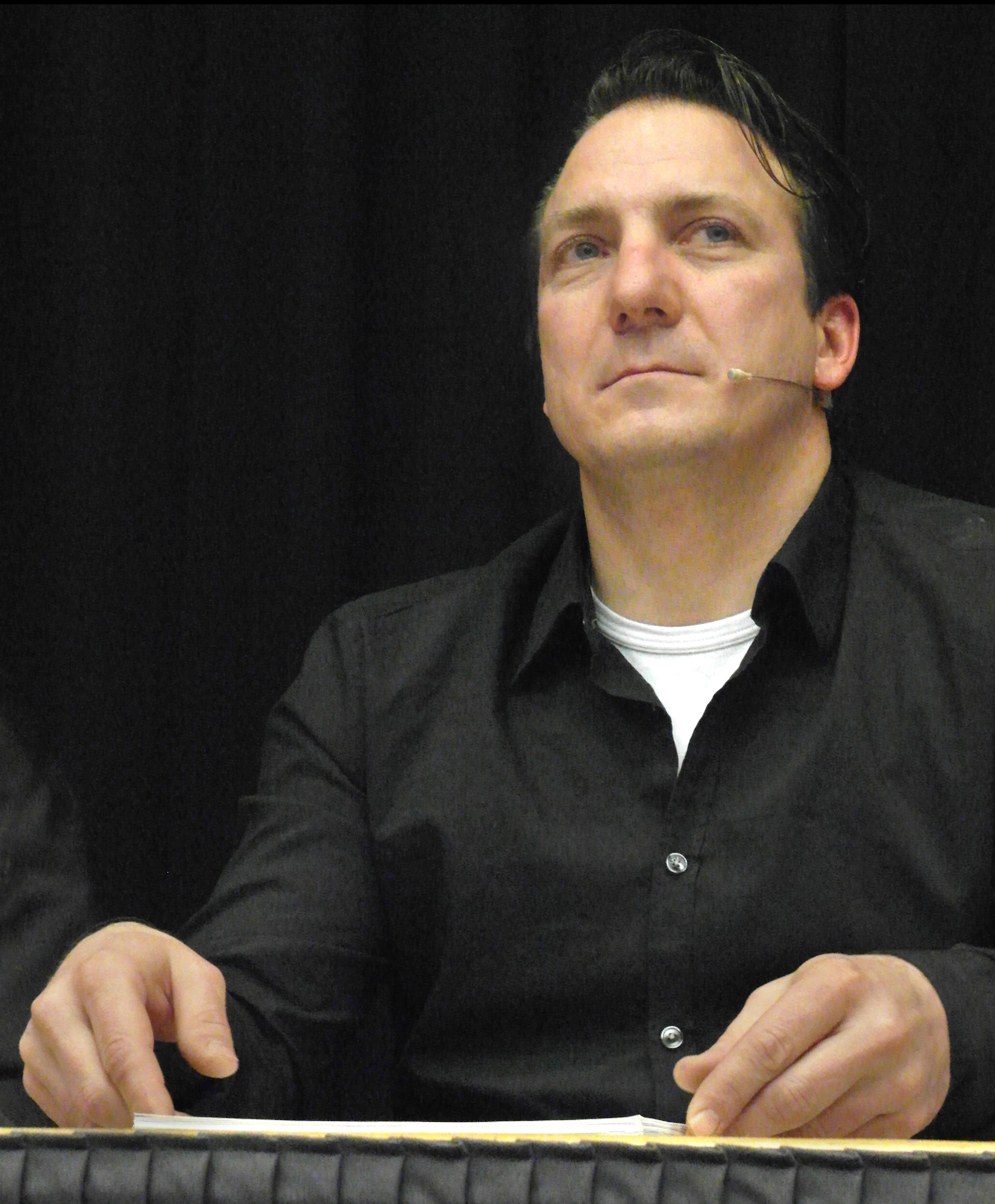 Vienna 2011-01-17 'Da bin ich jetzt supernackt' 125 Robert Palfrader edited ))